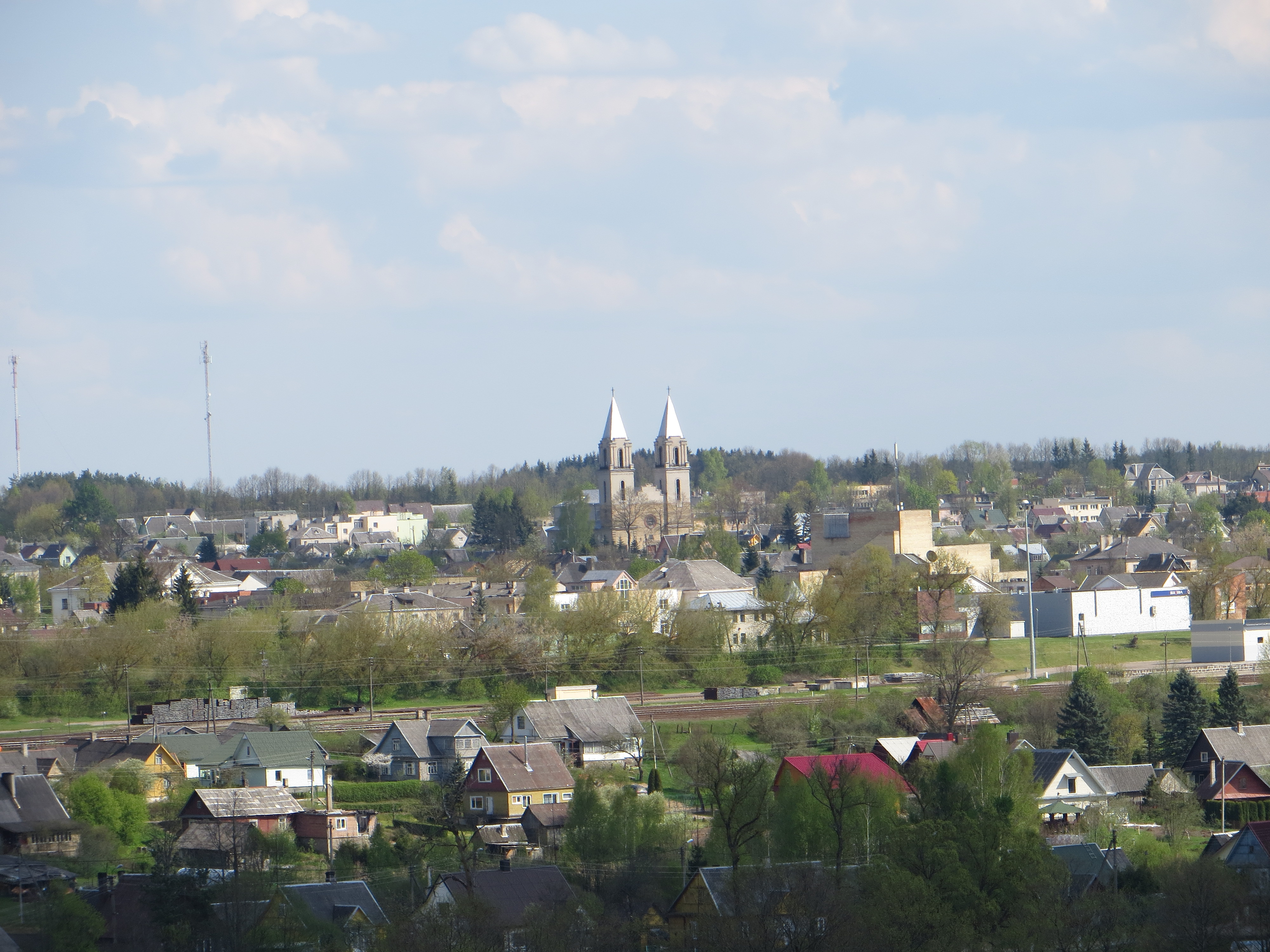 Platumai 18208, Lithuania